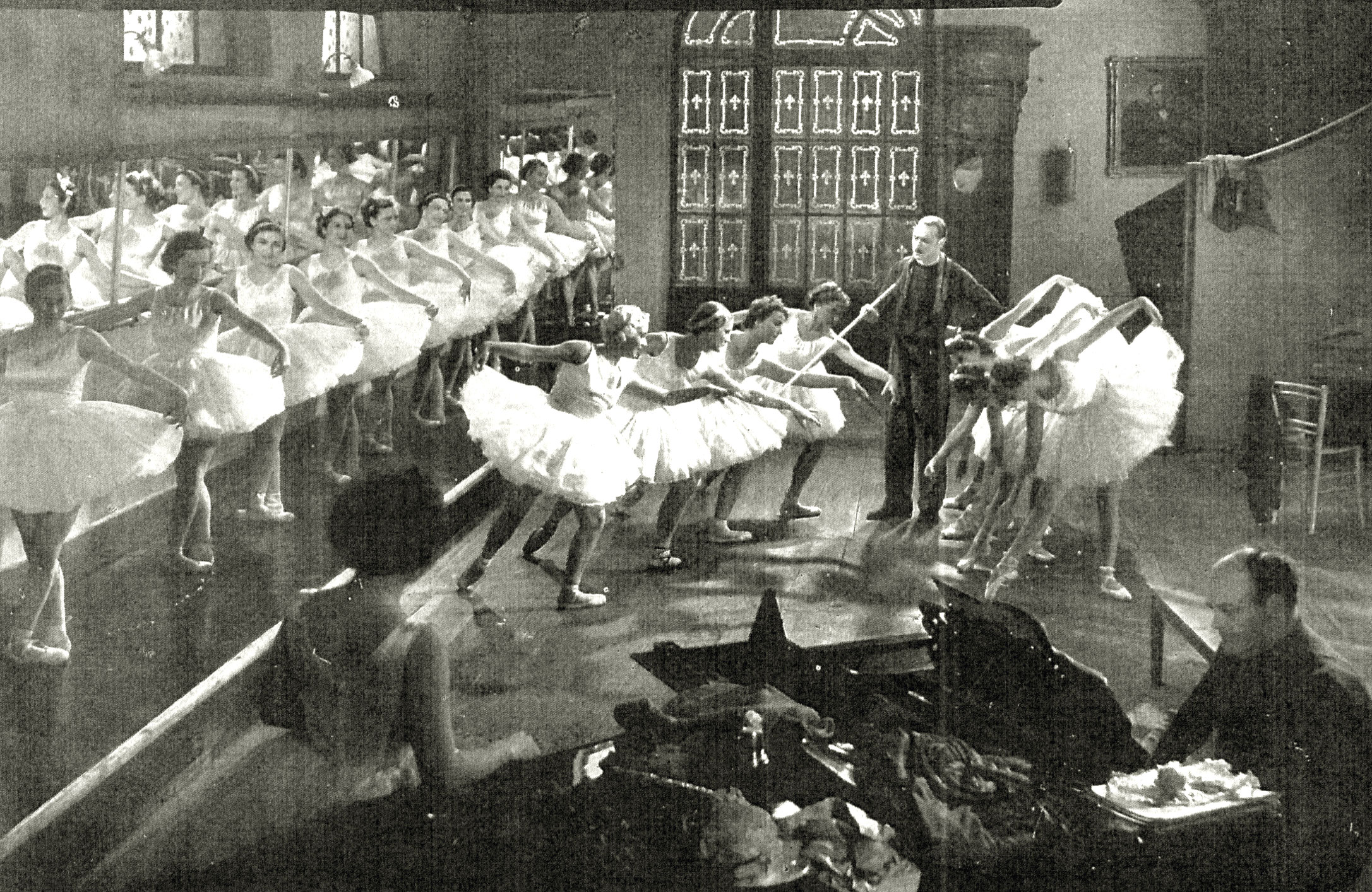 fotogramma di Ballerine regia G. Machaty prod AFI Tirrenia (It) 1936